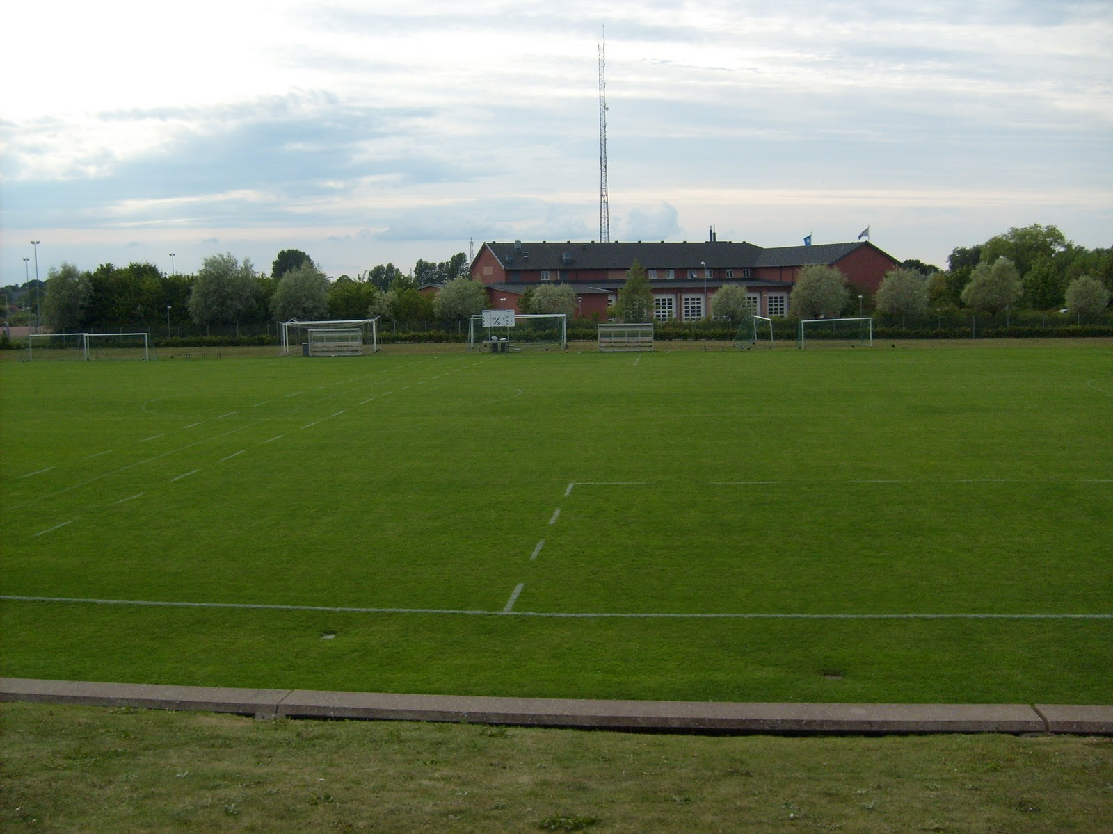 Hyllie IP vy från östra långsidan